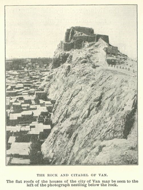 Der Felsen mit Zitadelle von Van (Türkei).Die flachen Dächer der Häuser schmiegen sich bis an den Felsen. Die Stadt Van wurde 1915 von den Türken (osman. Truppen) in Brand gesteckt, als sie den Rückzug vor der russischen Armee antraten. Die Russen unterstützten die armenischen Revolutionäre und blieben bis 1917 in Van.